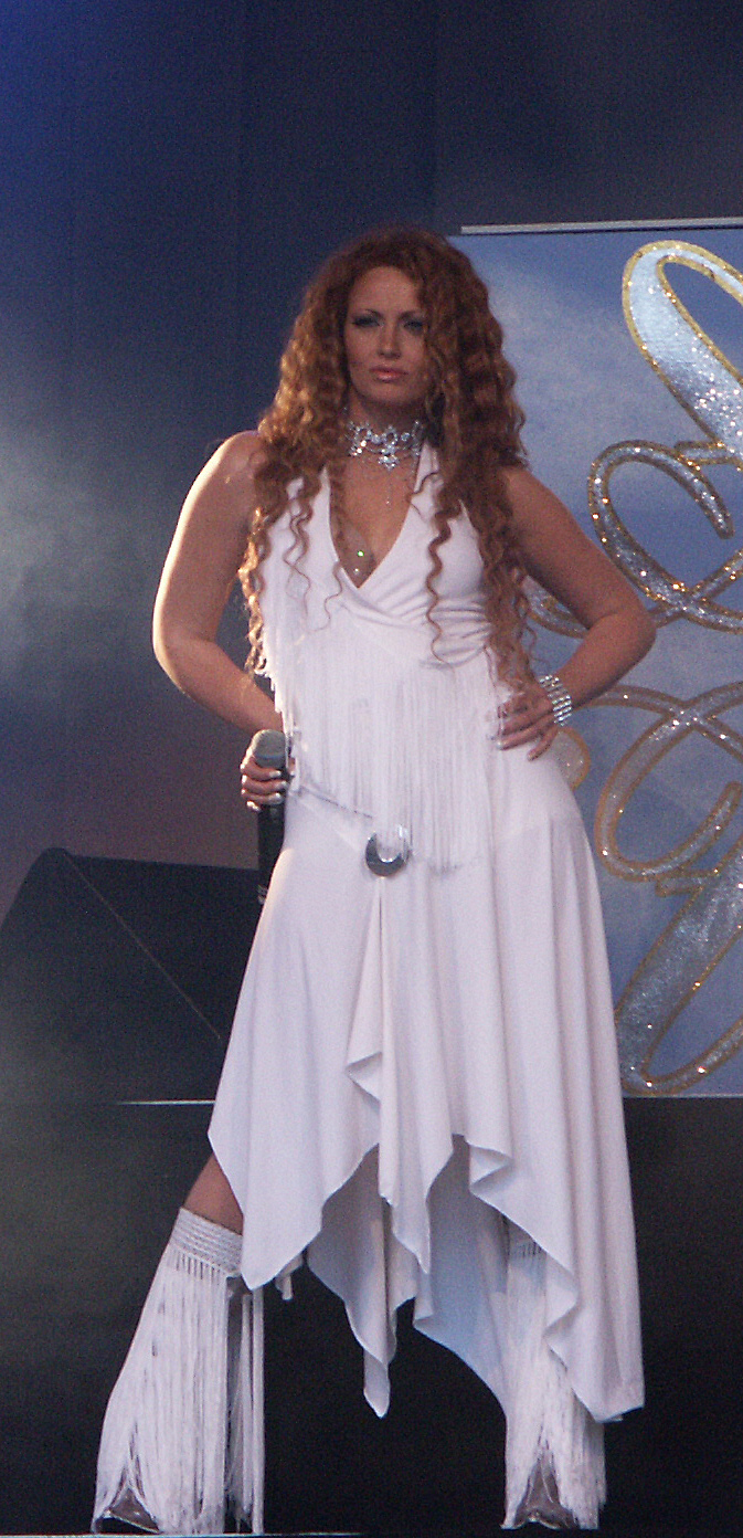 Annika Kjaergaard, då Alcazar framträder på Stora Torget i Borås